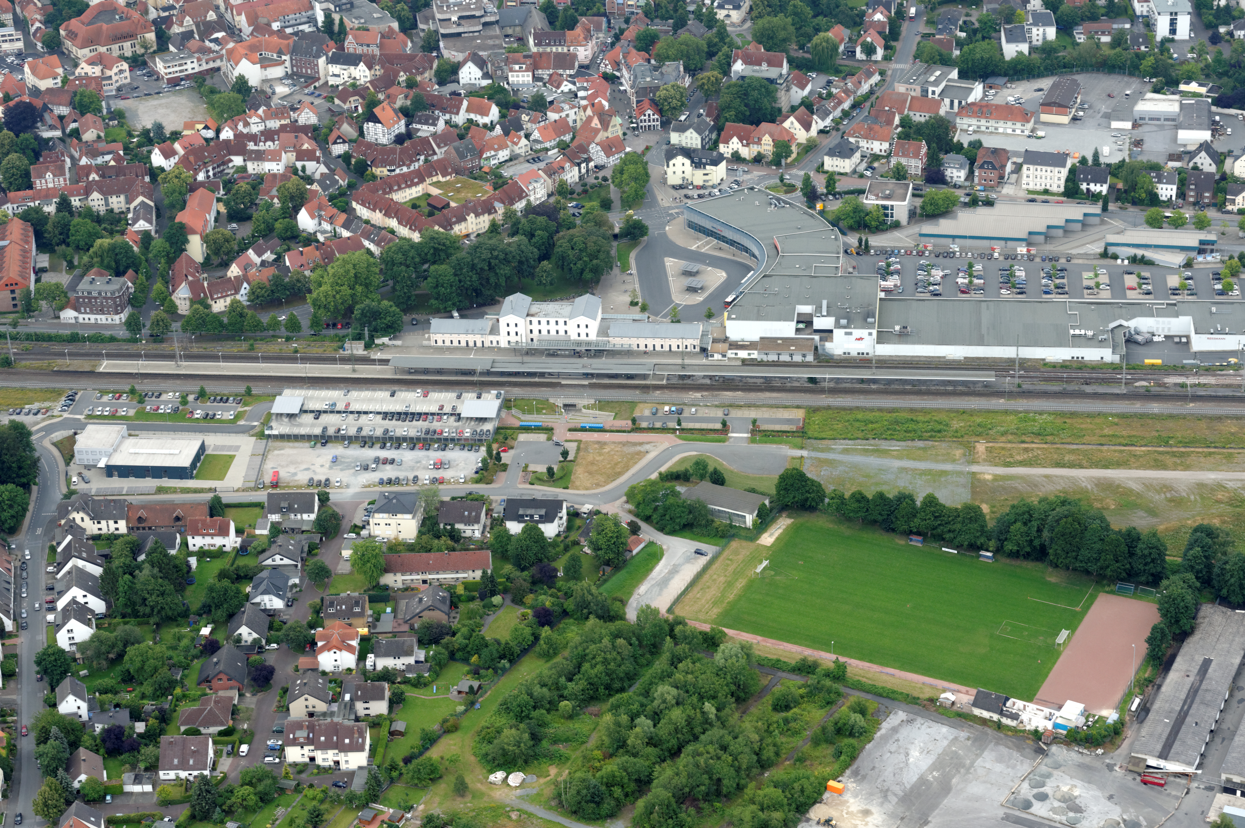 Fotoflug Sauerland Nord. Soest: Bahnhof und Einkaufszentrum „City-Center“, vorne Jahnplatz The making of this document was supported by the Community-Budget of Wikimedia Germany.